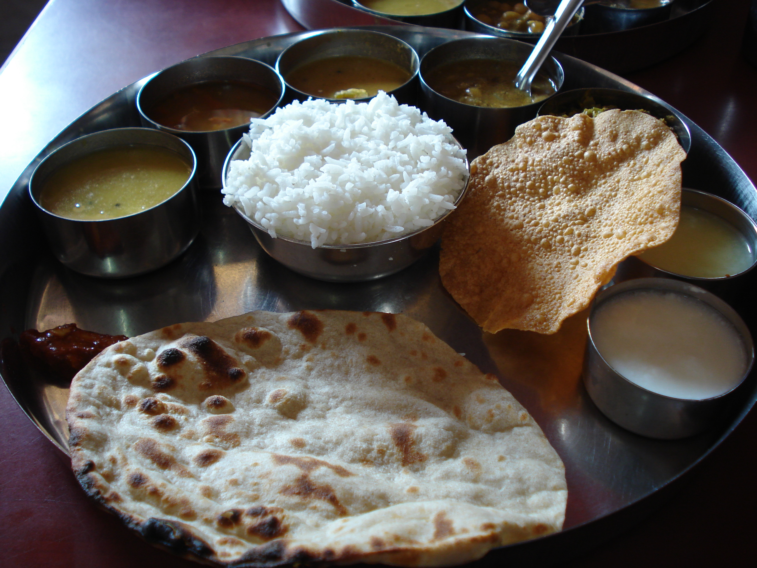 udupi's veg meal